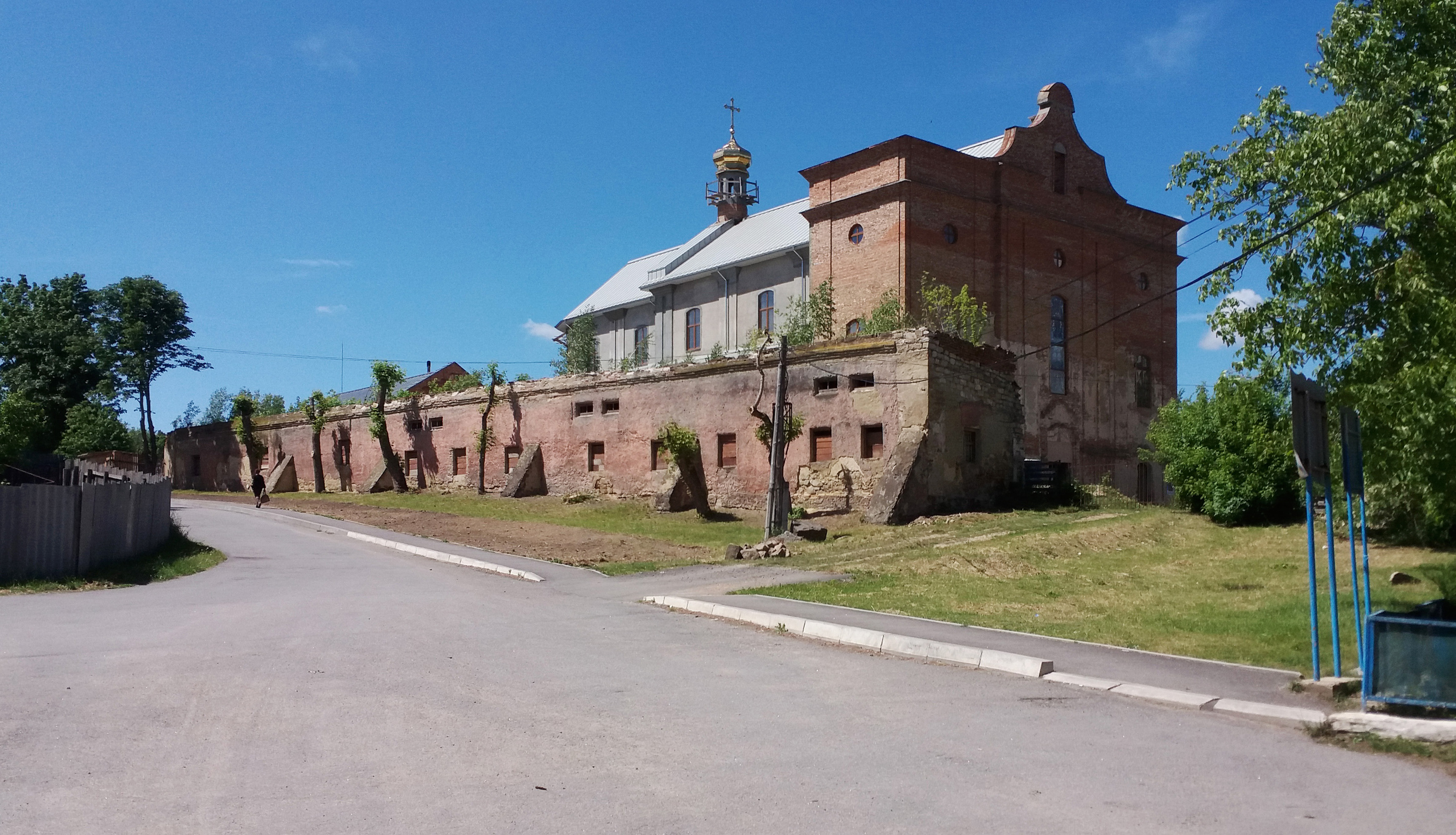 Костел Архангела Михаїла у Тиврові, Вінницька область, Україна